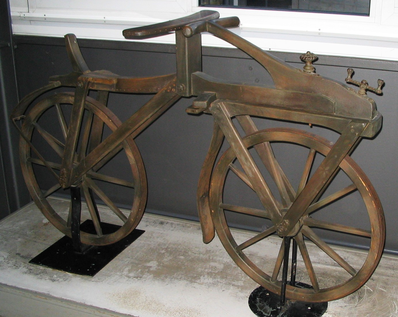 First Bicycle ("Draisienne") made by Karl-Friedrich von Sauerbrunn (1817) Photo taken at Technisches Museum in Berlin by Piotr Tysarczyk